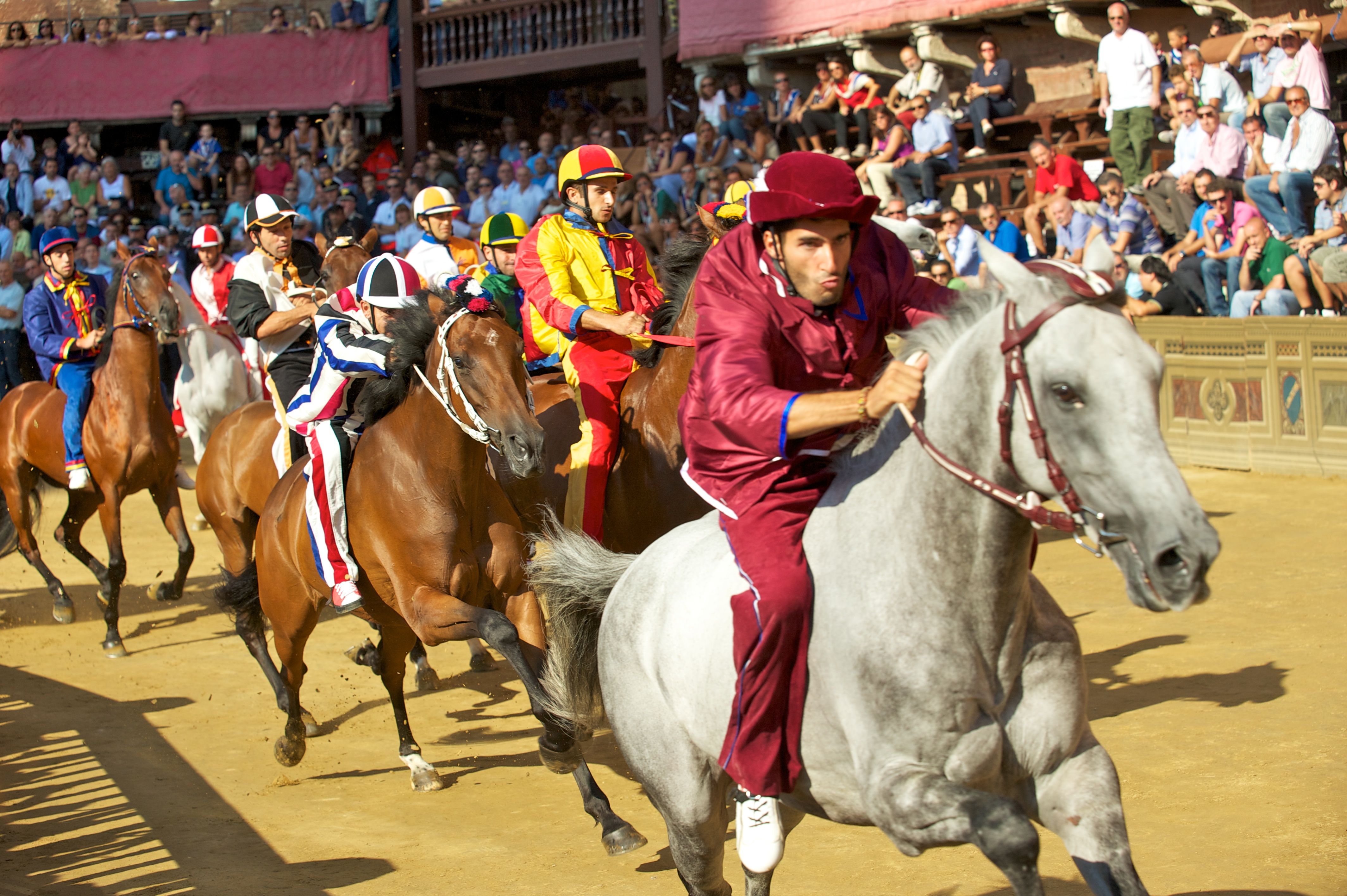 Una prova del Palio del 16/08/2011